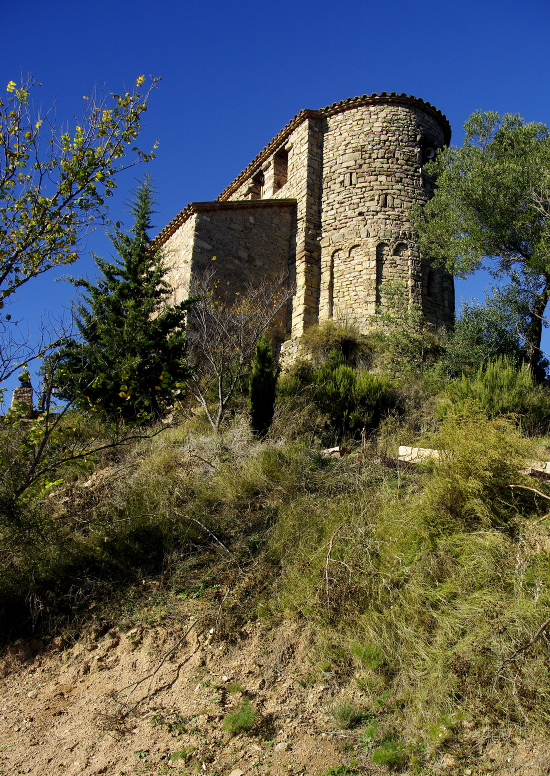 Castell de Gallifa